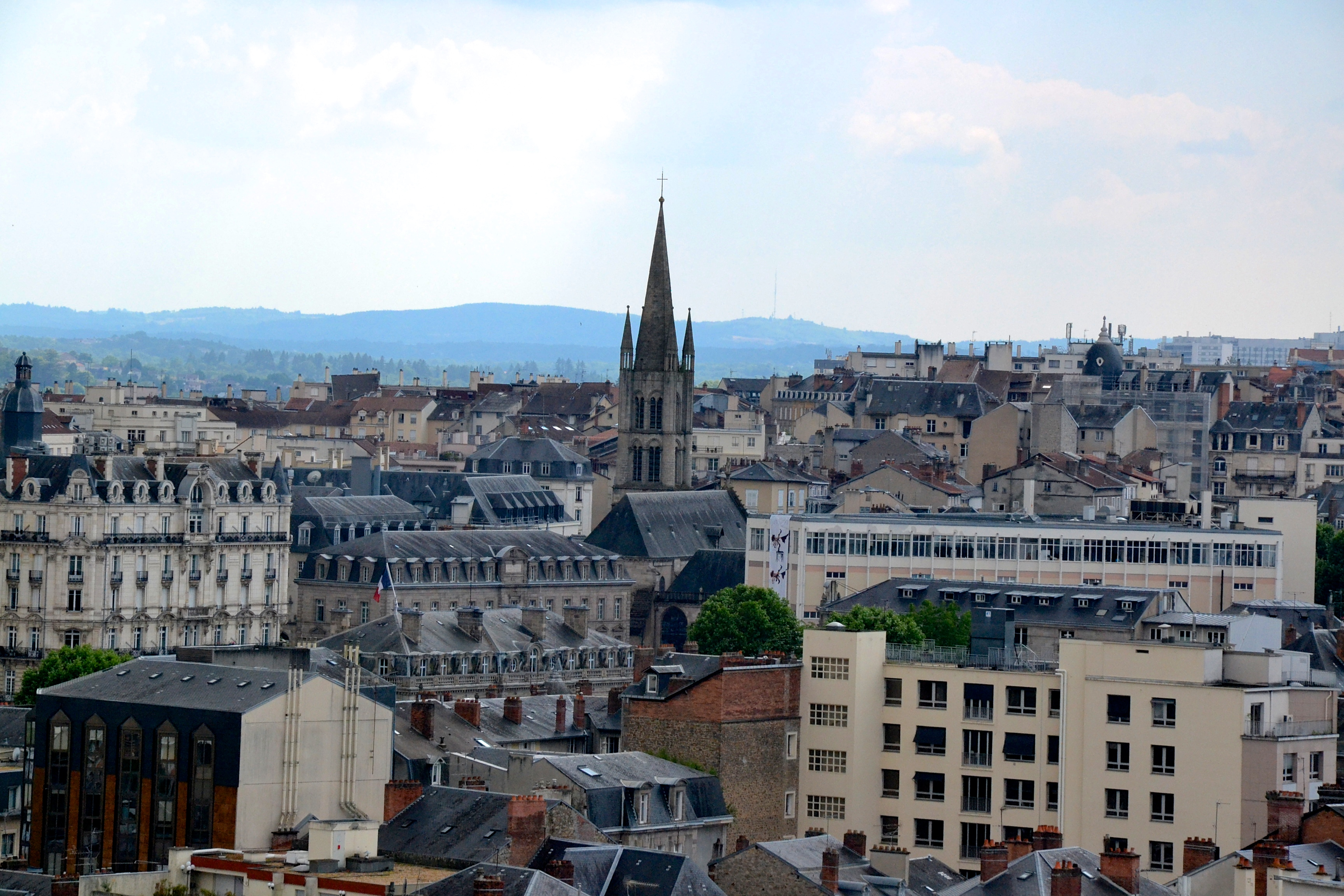 Vue sur l'église Saint-Pierre-du-Queyroix, le centre-ville de Limoges et au loin le massif des Cars, depuis le campanile de la gare des Bénédictins.